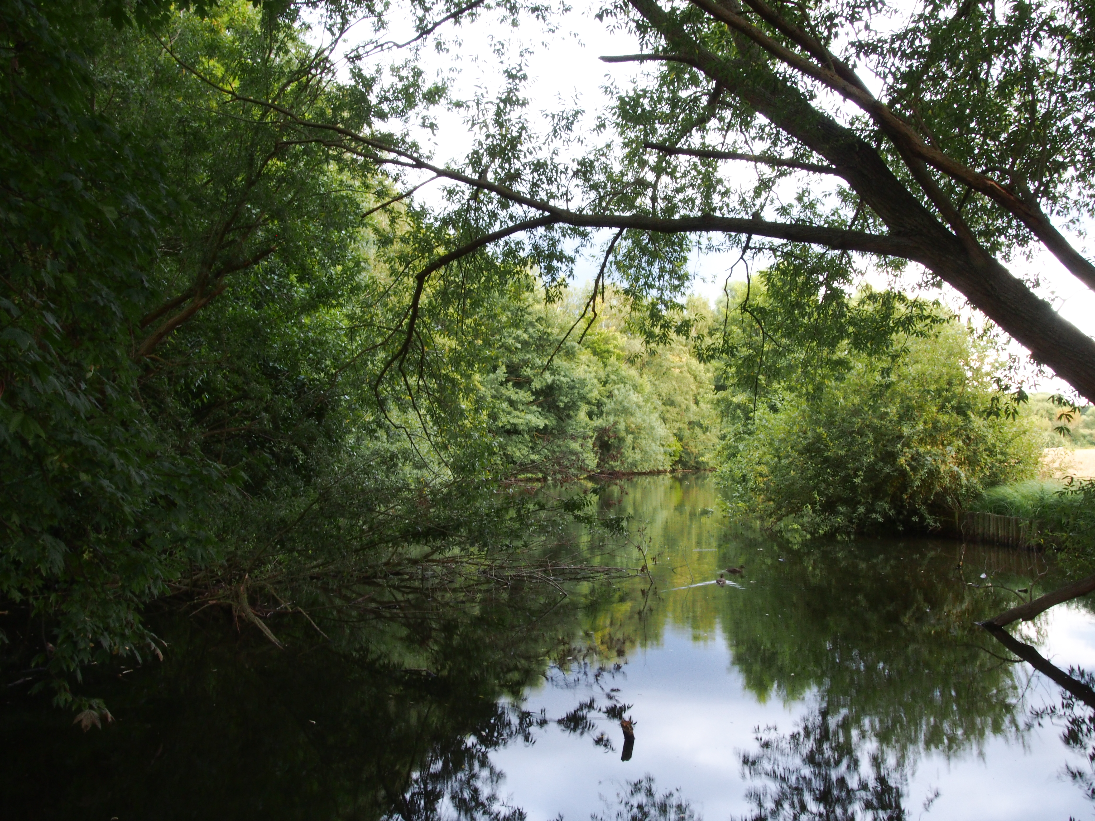 Naturschutzgebiet „Taubensemd von Habitzheim, Semd und Groß-Umstadt“ (Hessen, Darmstadt-Dieburg)